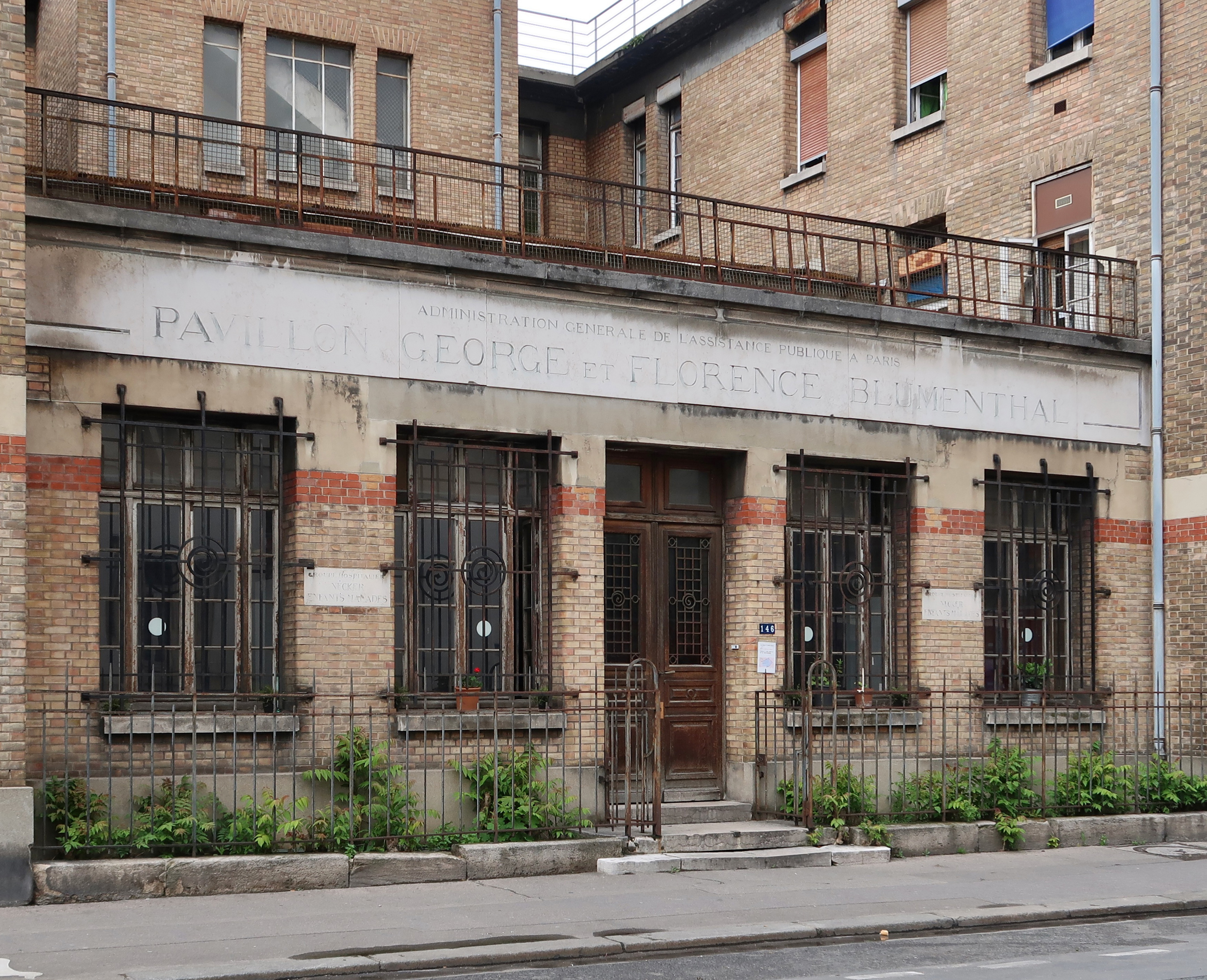 Pavillon George et Florence Blumenthal (Administration générale de l'assistance publique à Paris, hôpital Necker), 146 rue de Vaugirard (Paris, 15e).